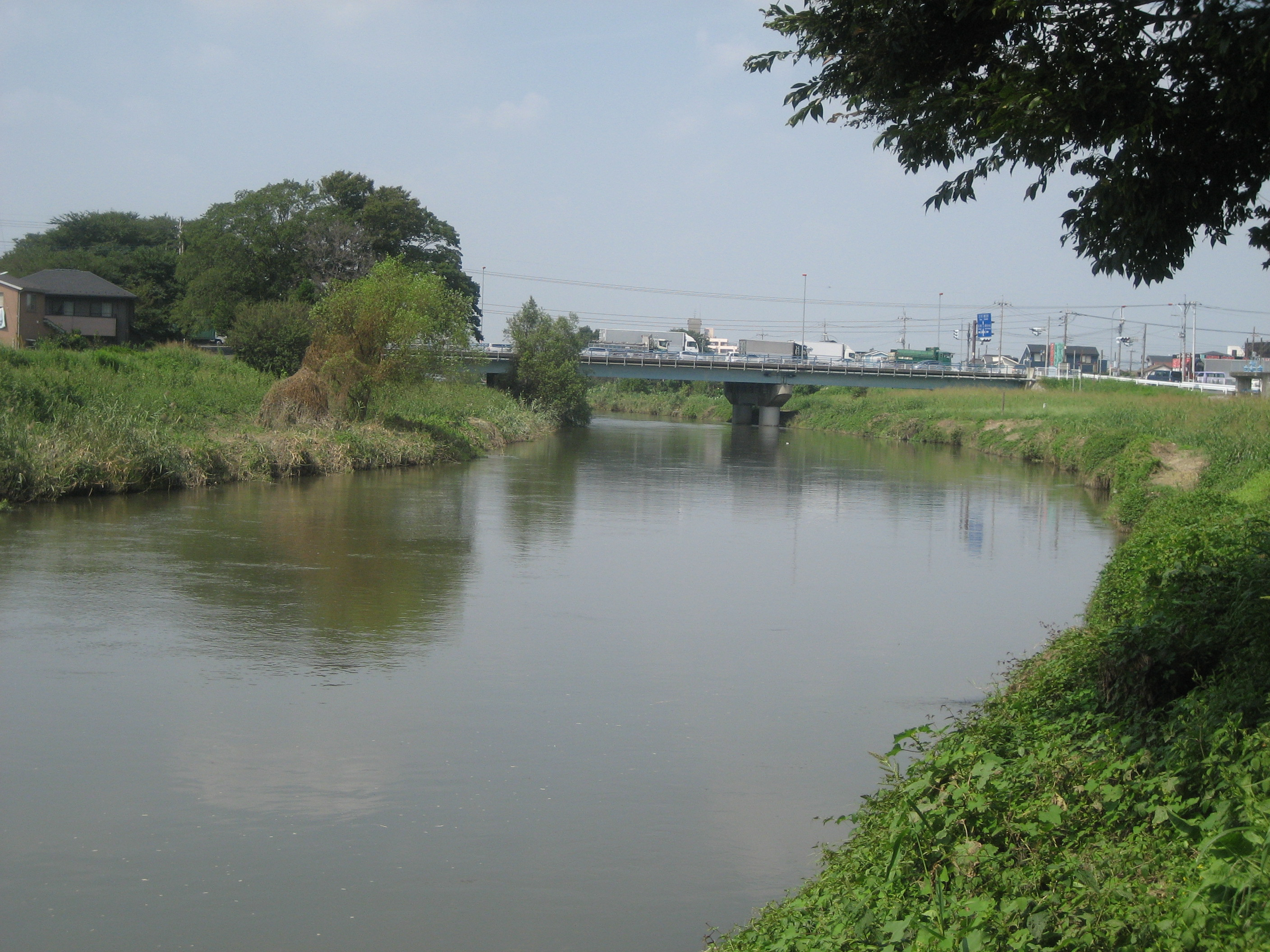 元荒川越谷市内